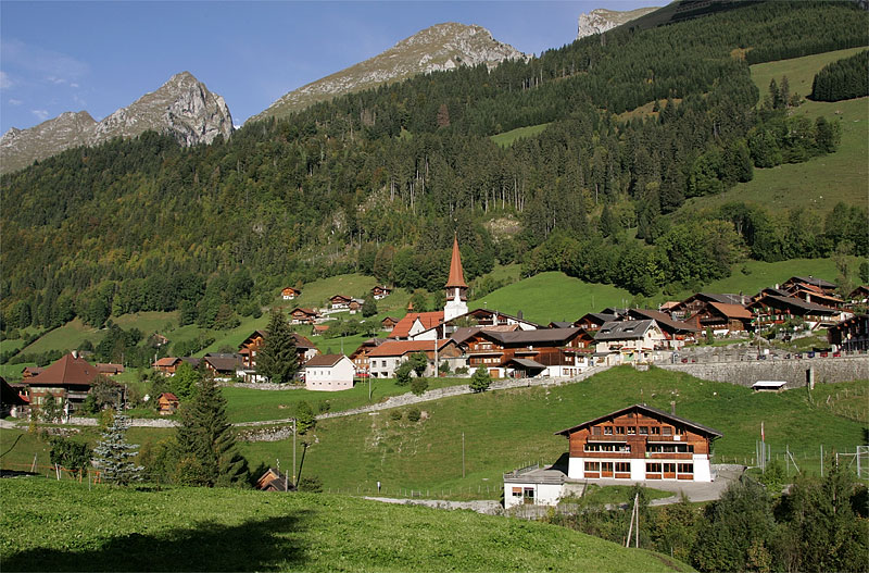 Jaun am Jaunpass